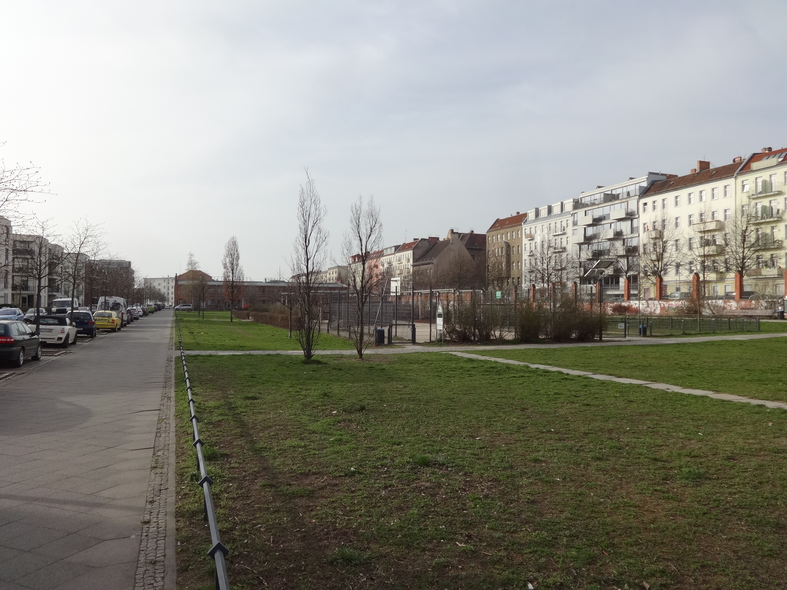 Der Hausburgpark ist eine rund 12.000 m² große Grünfläche in Berlin-Prenzlauer Berg. Er liegt auf dem 1995 stillgelegten Zentralvieh- und Schlachthof und ist Bestandteil eines vom Berliner Senat geförderten Umbauprogramms Entwicklungsgebiet Alter Schlachthof. Auf der Flächen befinden sich insbesondere ein Spielplatz sowie ein unter Denkmalschutz stehender Wasserturm.